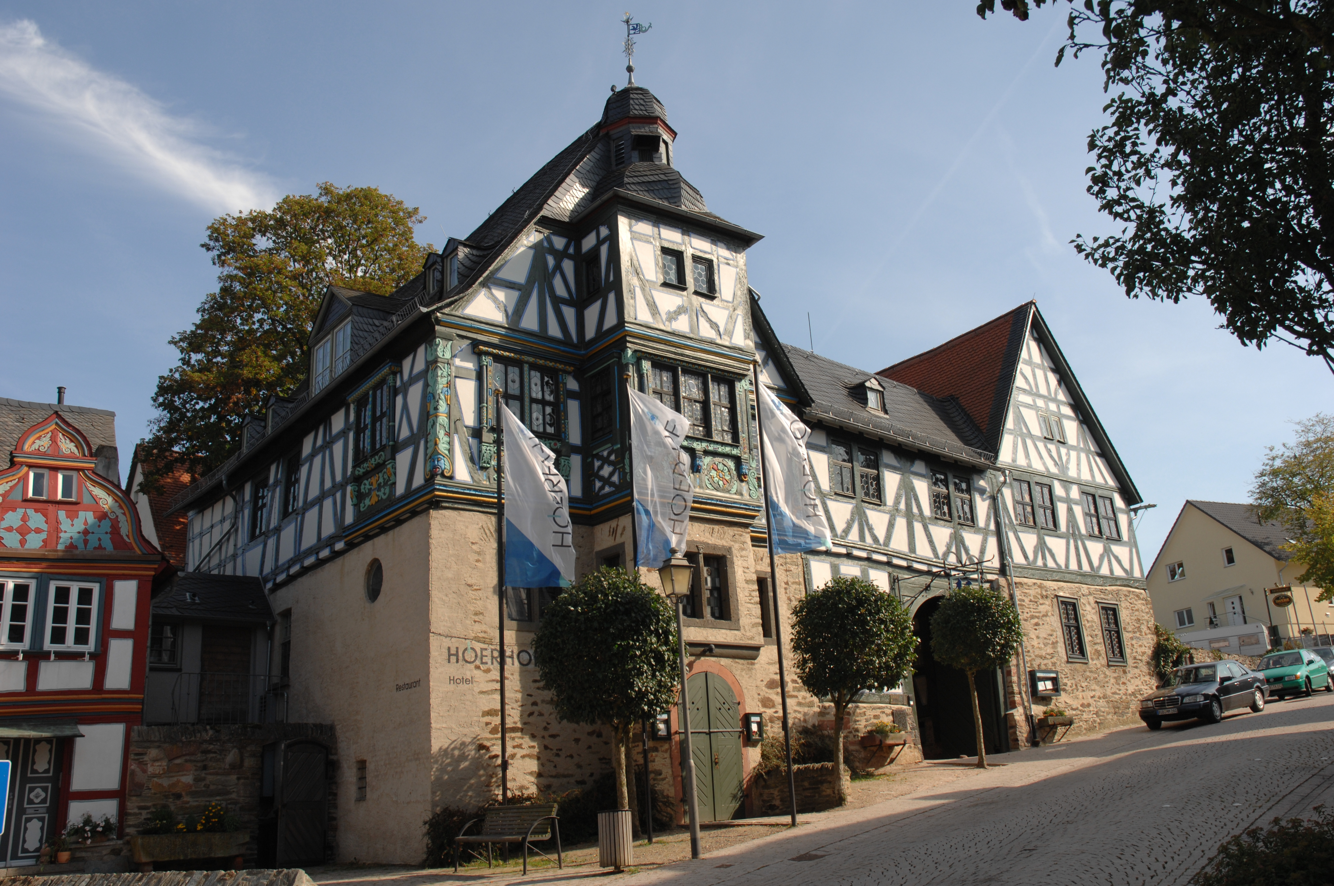 Außenansicht des Höerhofs